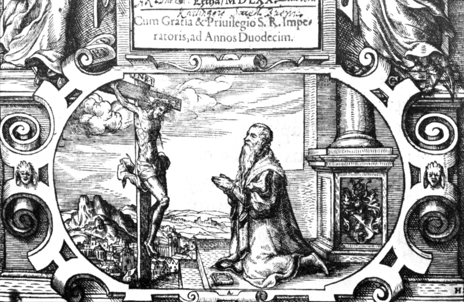 Jiří Melantrich z Aventina klečí před křížem, výřez dřevořezu z titulní strany Bible Melantrichovy z roku 1570